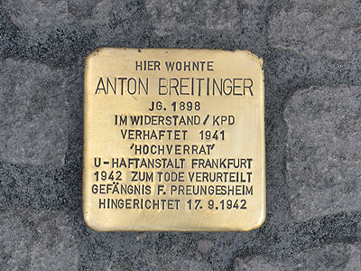 Stolpersteine Neebstraße 3